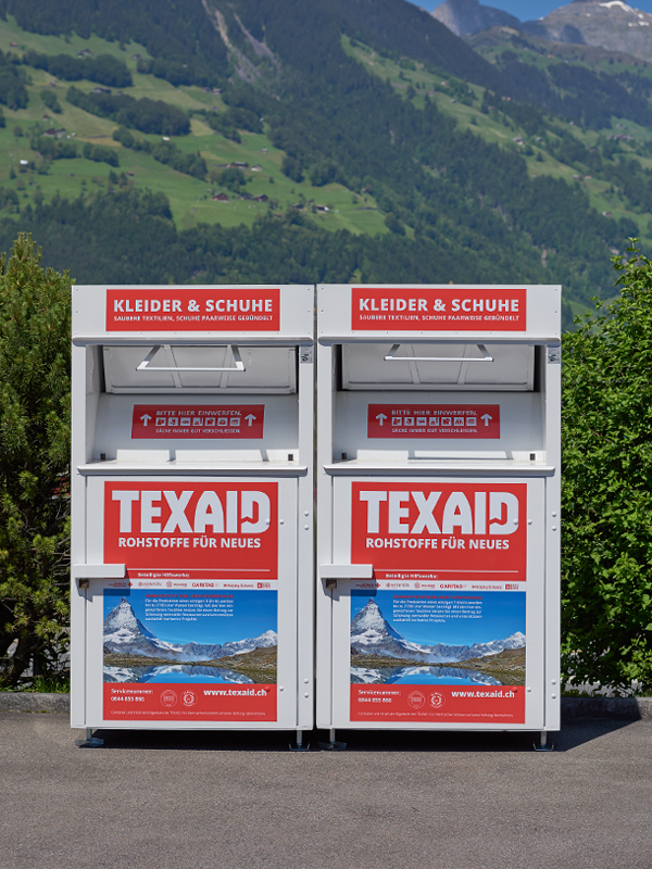 TEXAID Alttextilcontainer in Schattdorf (Schweiz)